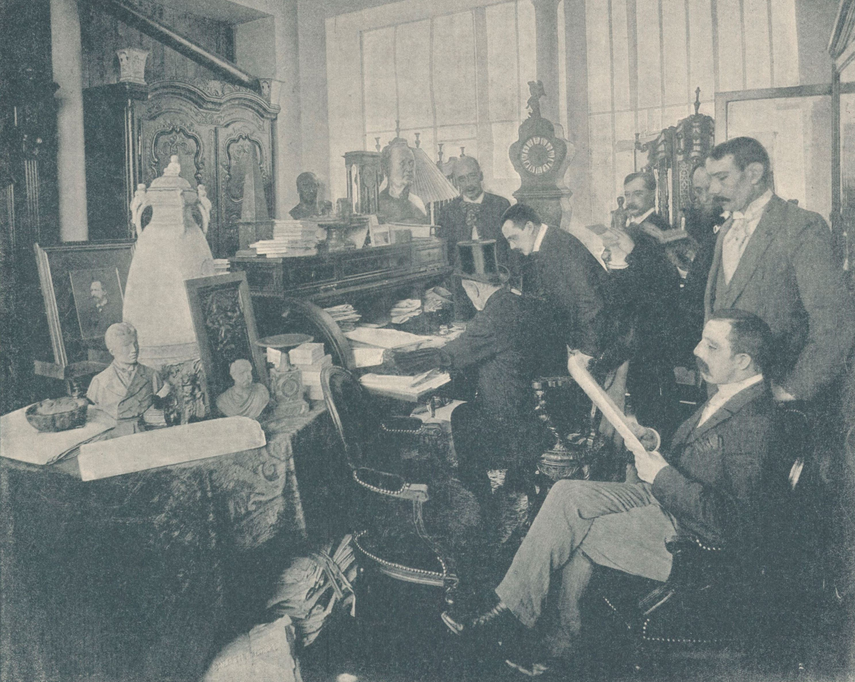 "Le cabinet de M. Janicot, directeur de la Gazette de France".